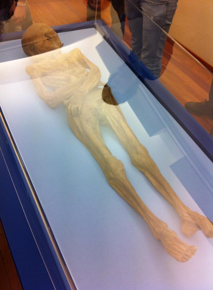 La mummia al Museo di Villa Mirabello a Varese